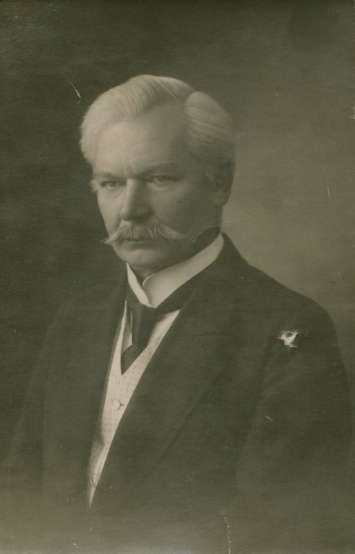 Educator Pranas Mašiotas in 1923